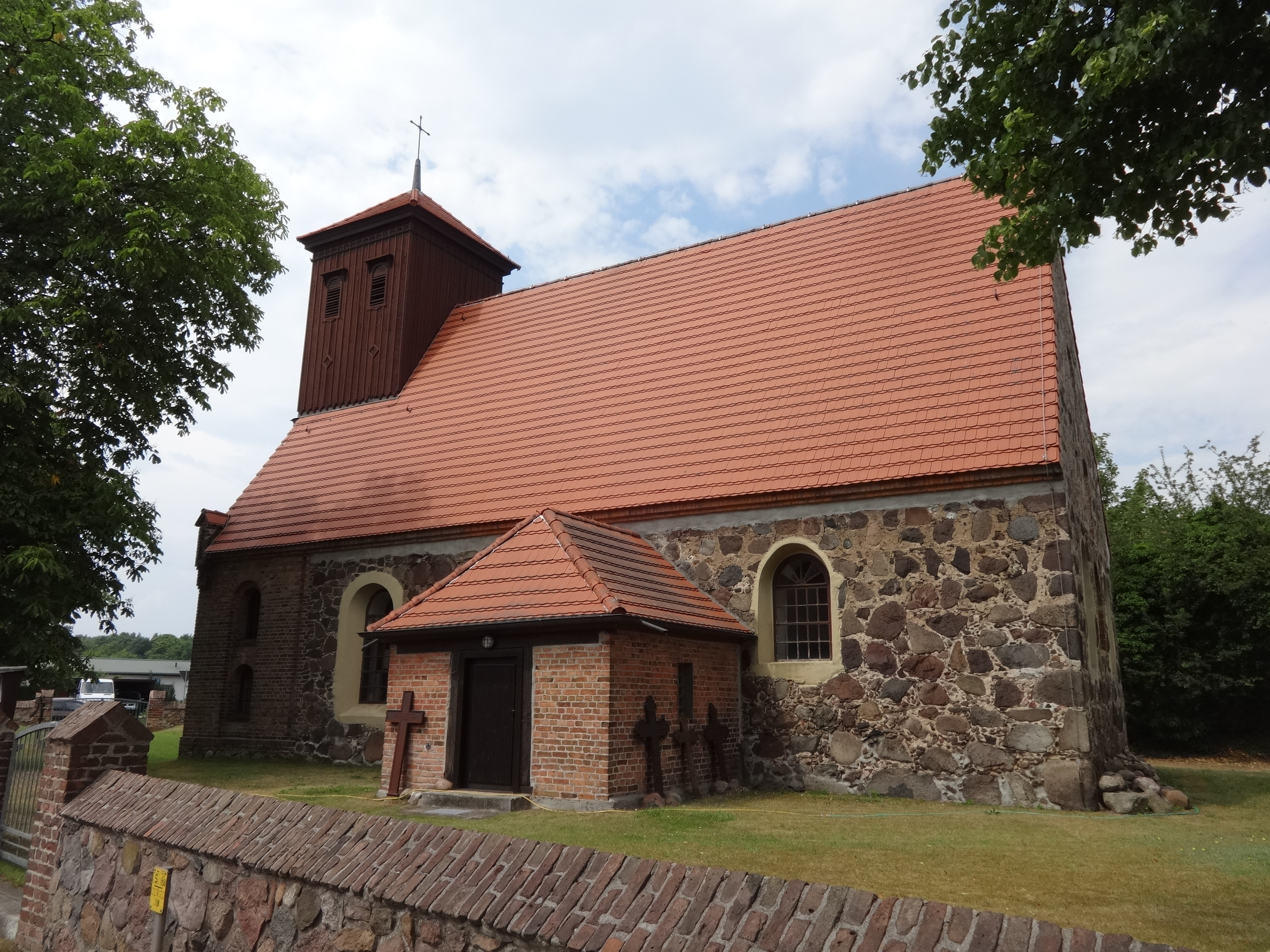 Die Dorfkirche im Ortsteil Groß Besten entstand vermutlich Ende des 14. Jahrhunderts. In den Jahren 1883 bis 1884 erweiterte die Kirchengemeinde das Bauwerk in Richtung Westen um den Turm sowie eine Vorhalle an der Südseite der Kirche. In den Jahren 1975 bis 1980 wurde sie umfangreich restauriert. Im Innern des flach gedeckten Bauwerks befinden sich ein schlichter Altaraufsatz sowie eine Fünte aus dem 17. oder 18. Jahrhundert.